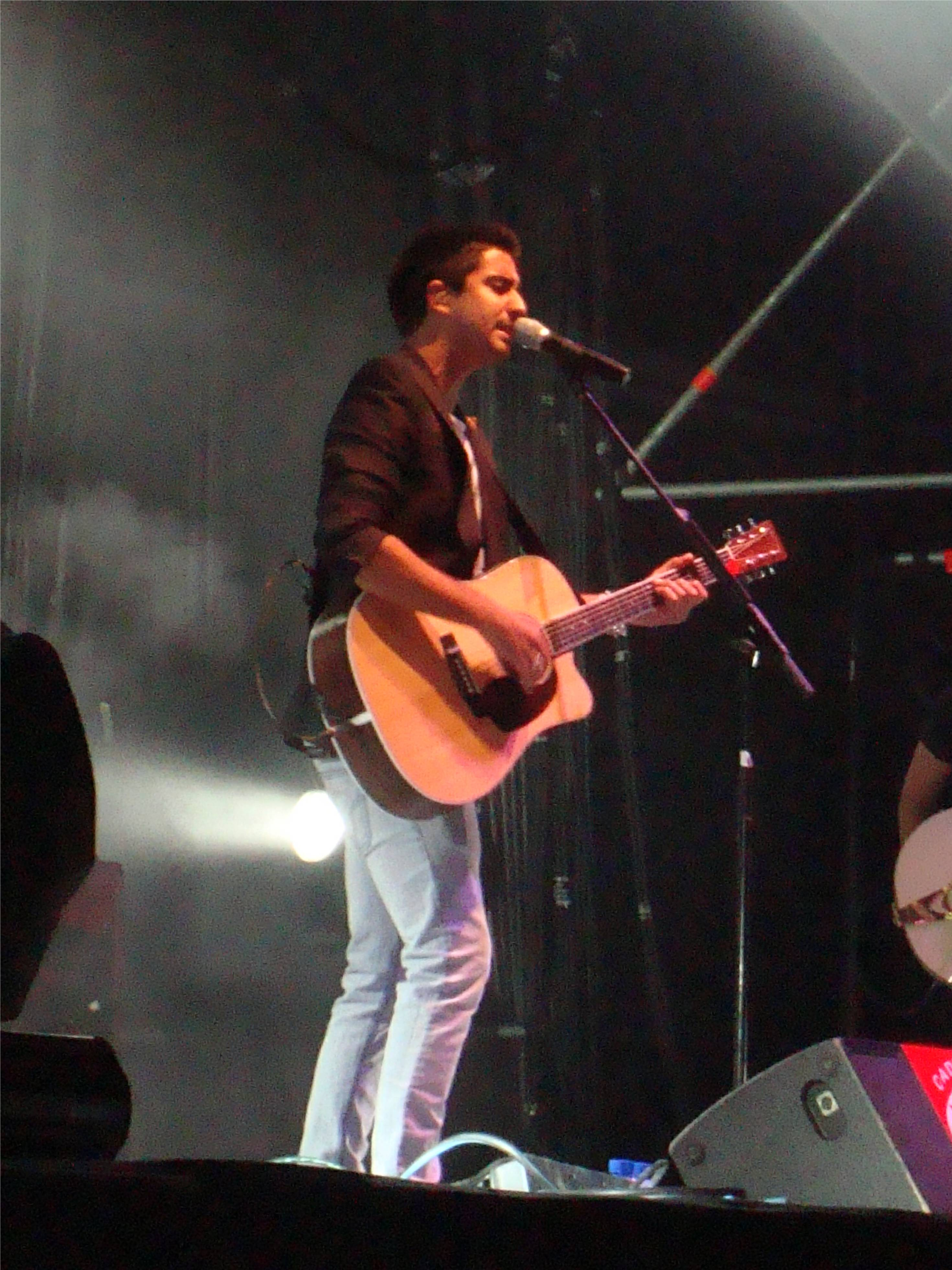 Alex Ubago en concert a les festes de la Mercè a Barcelona.